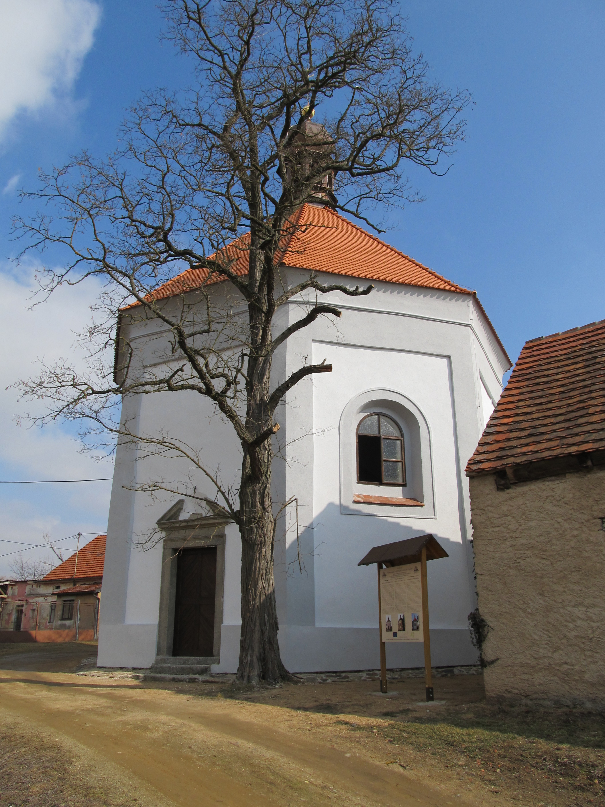 Telice - obnovená kaple Panny Marie